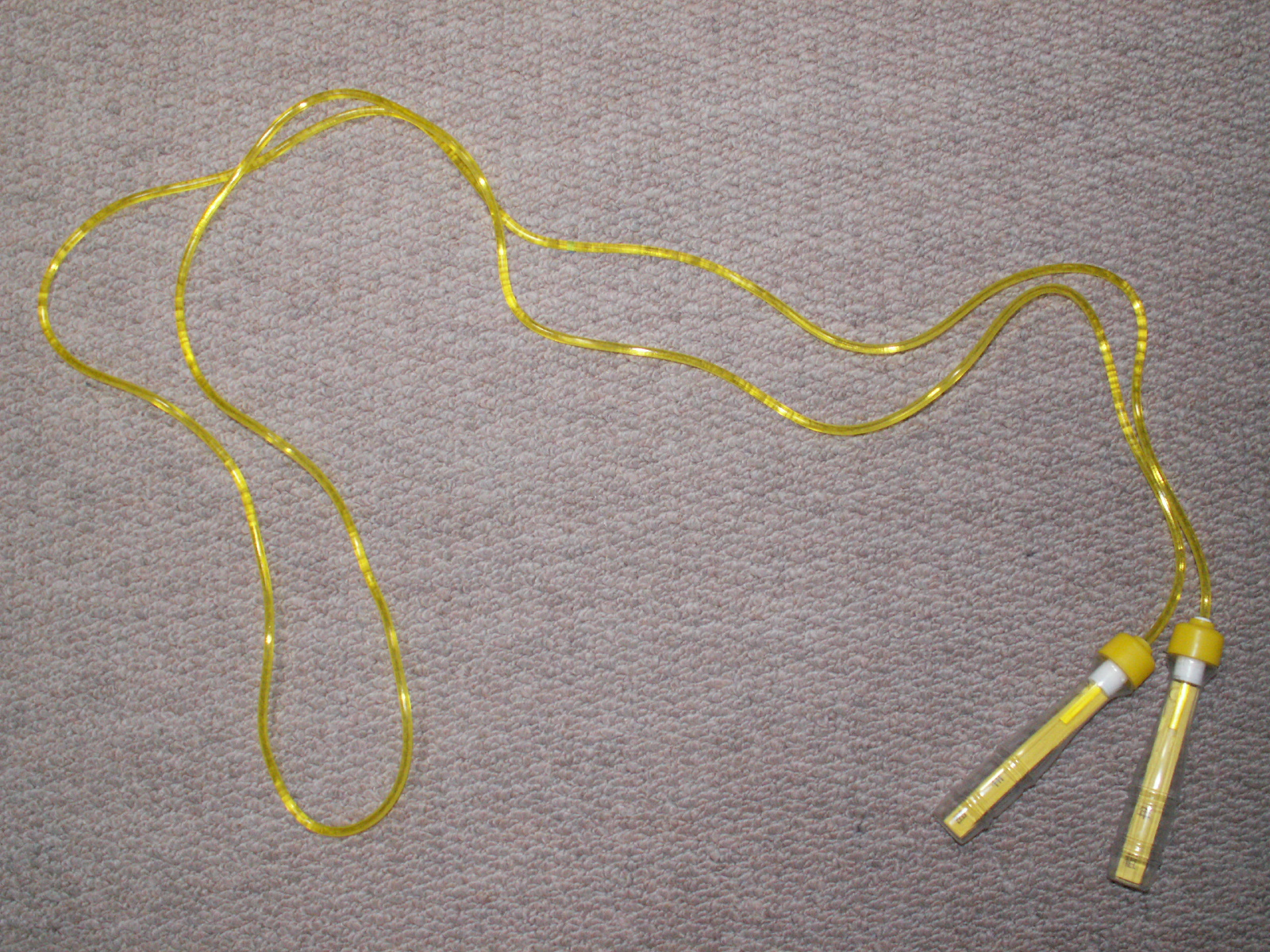 Jump rope（縄跳び、縄跳び用の縄）